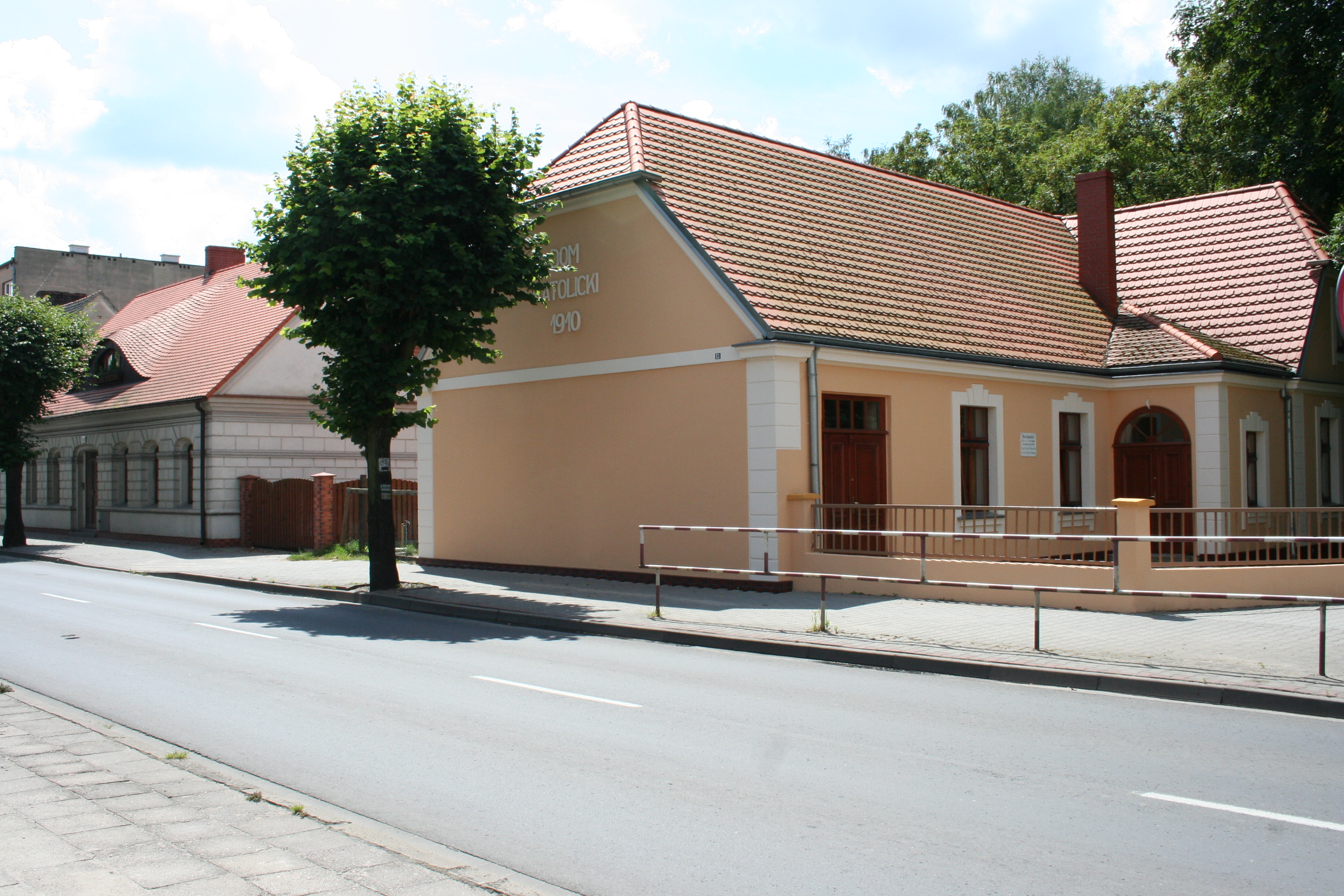 Ulica Poznańska i Dom Katolicki w Sierakowie